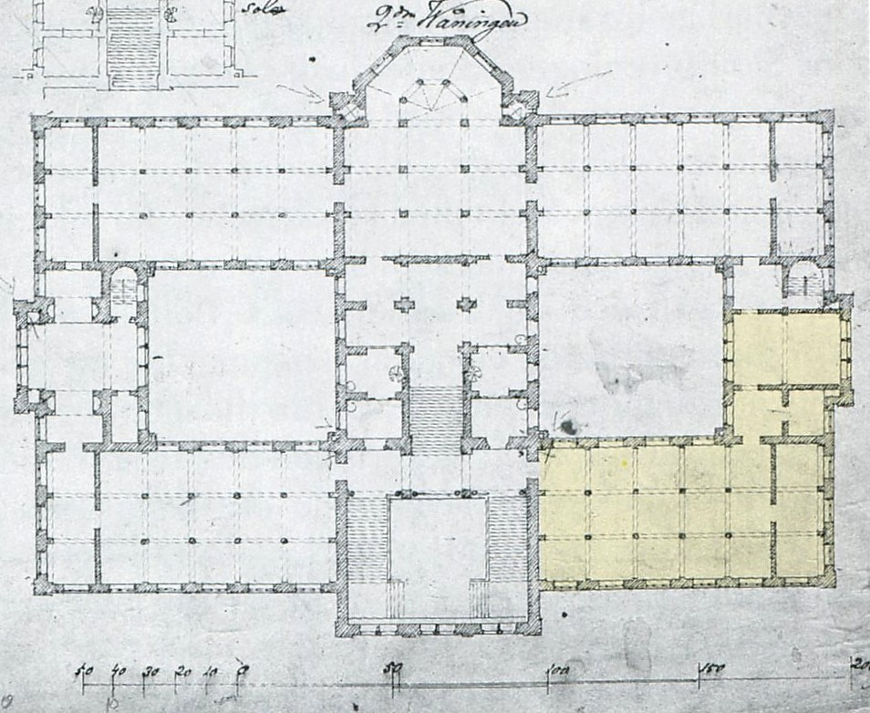 Nationalmuseets mellanvåning, arkitektritning